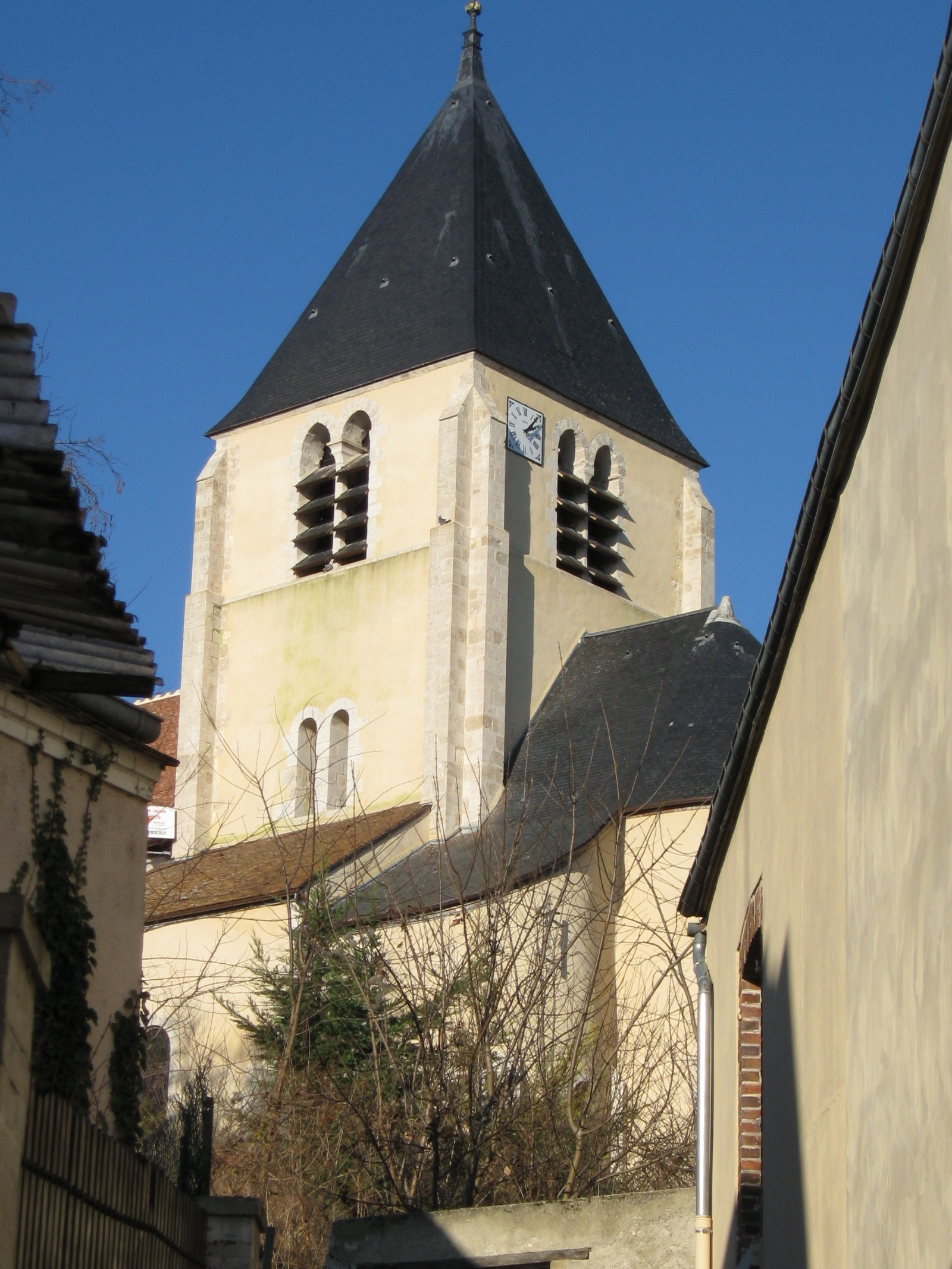 église Saint-Loup de Cepoy